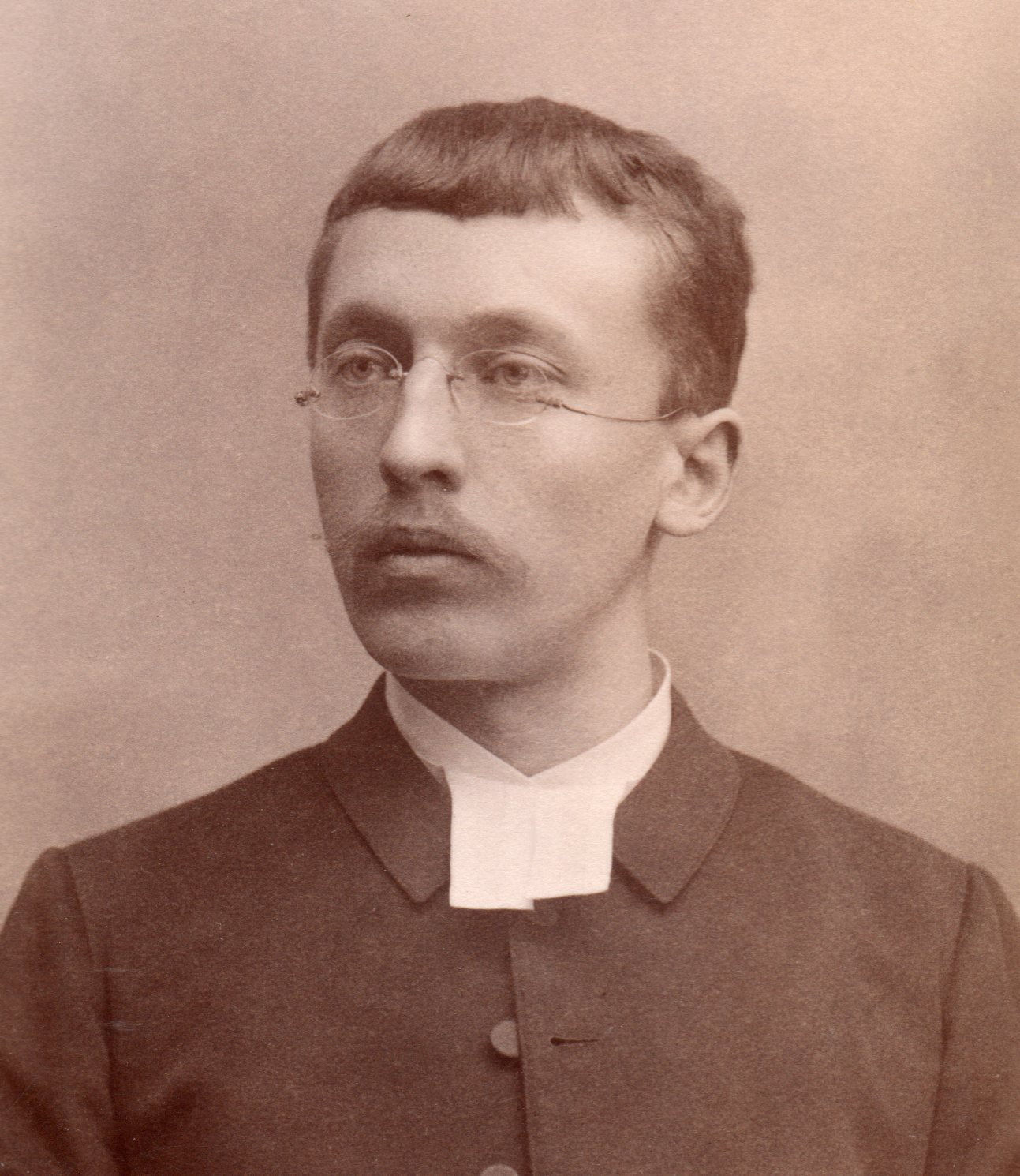 Emil Törnwall